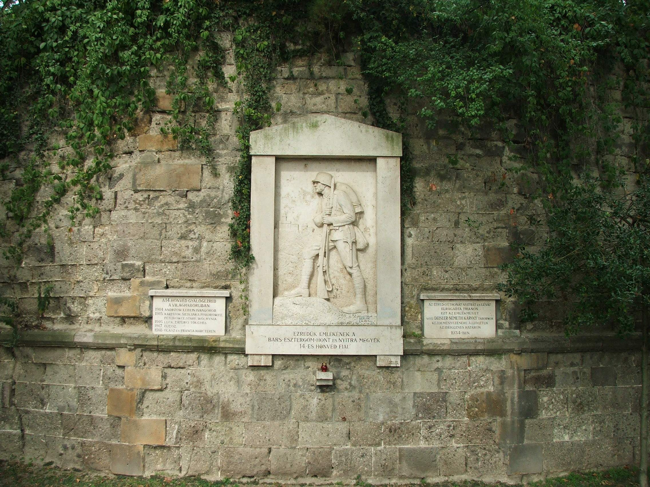 VIlágháborús emlékmű, Esztergom